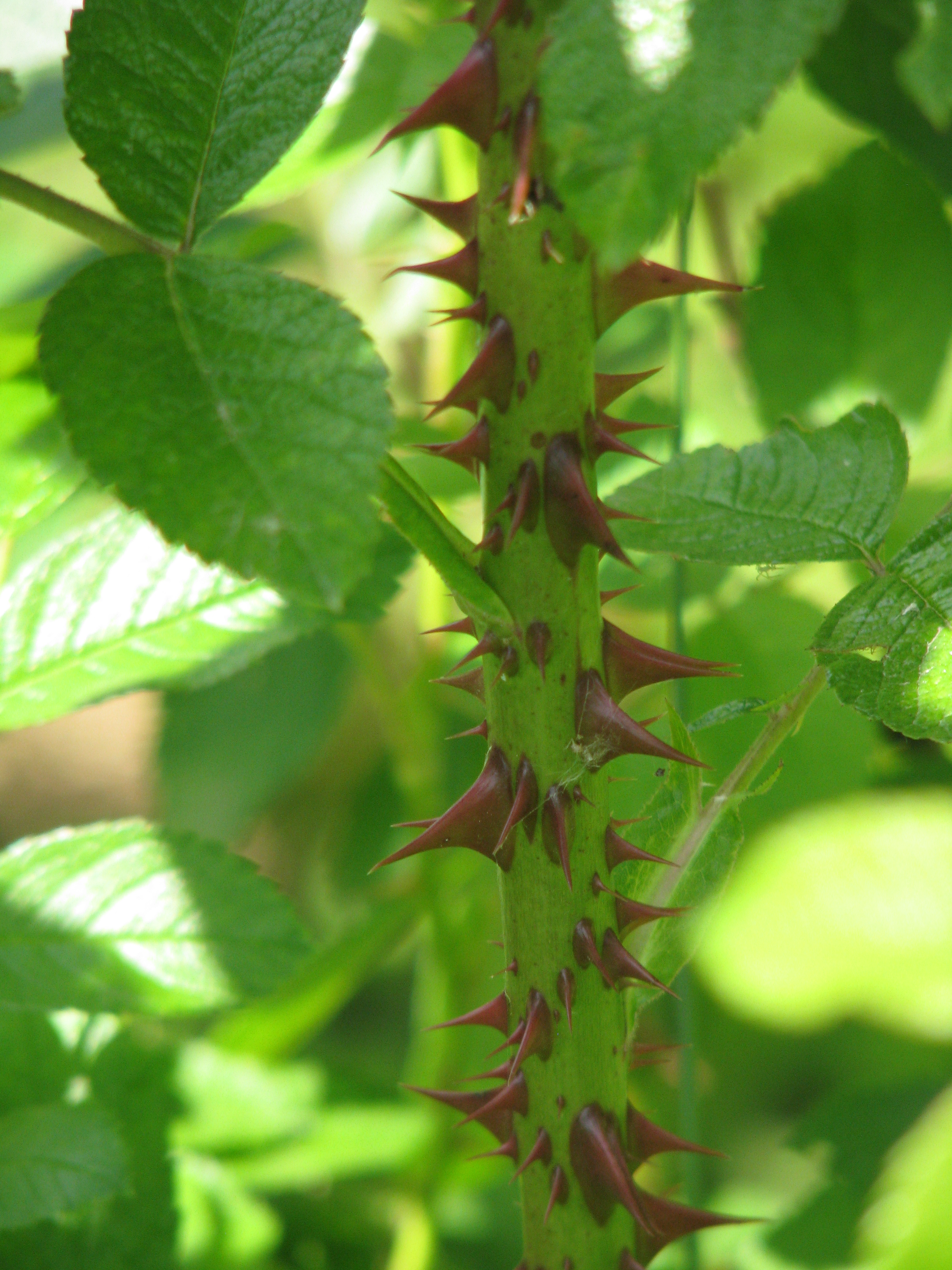 Rosa 'Morden Blush' шипы